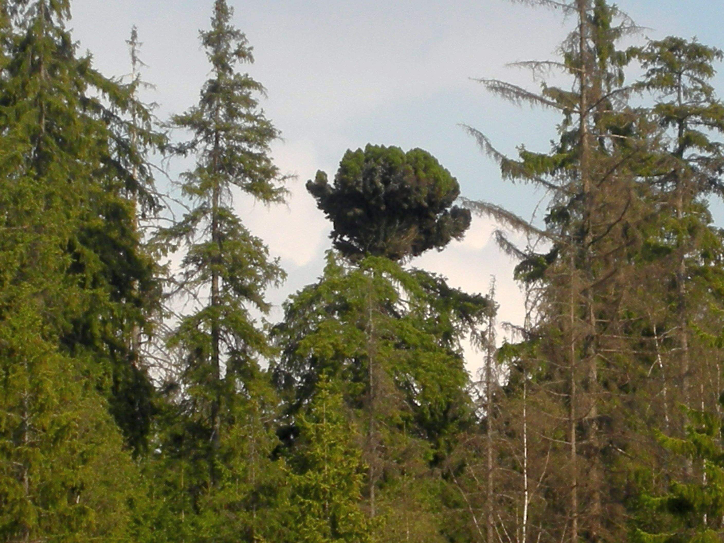 Kronenverwachsung (Hexenbesen) im Naturpark Kladské (CZ)